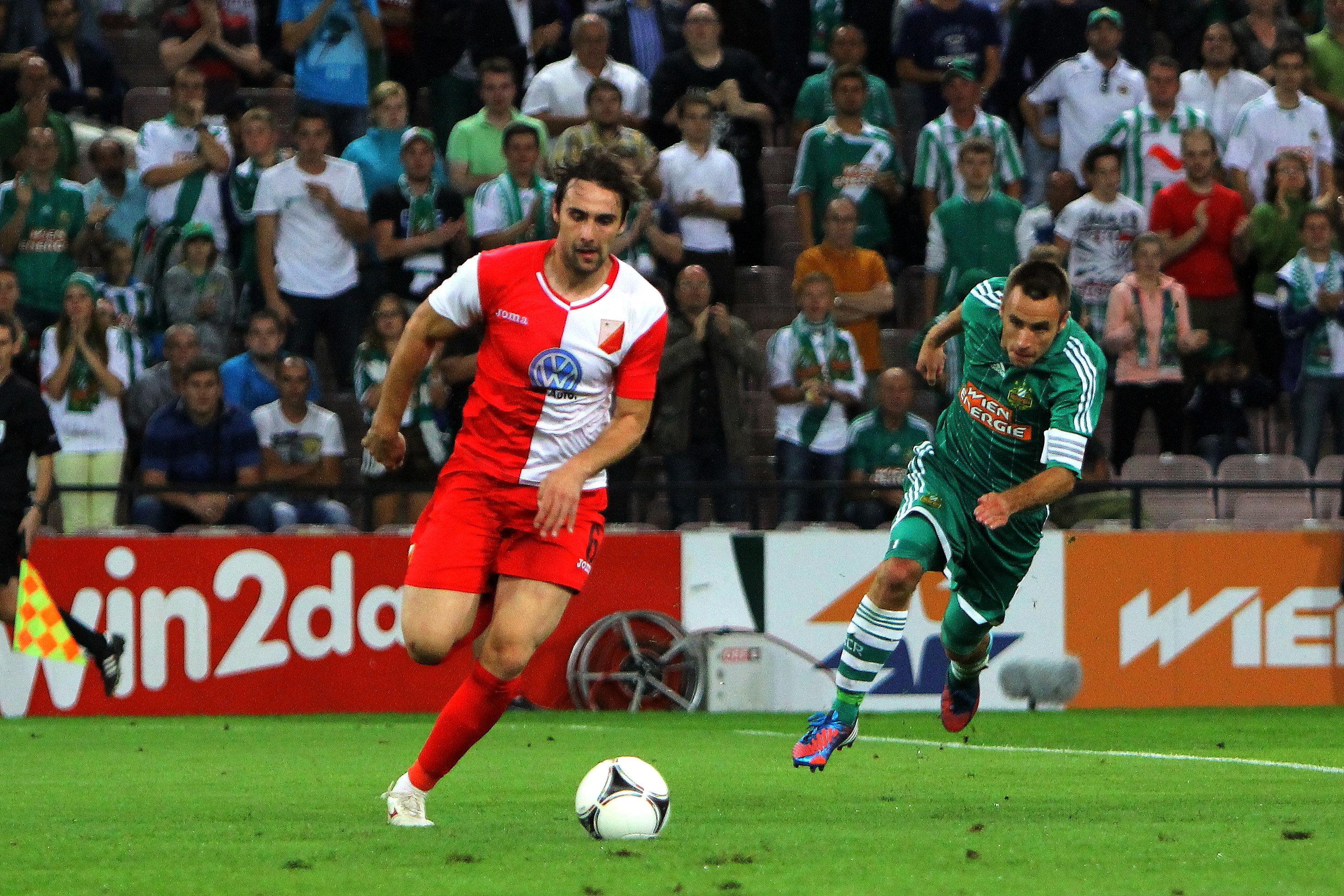 11 Hofmann(2)